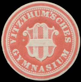 Sealing stamp Title: Vitzthumsches Gymnasium Description: rot, weiß, geprägt Place: Dresden size: 3 cm